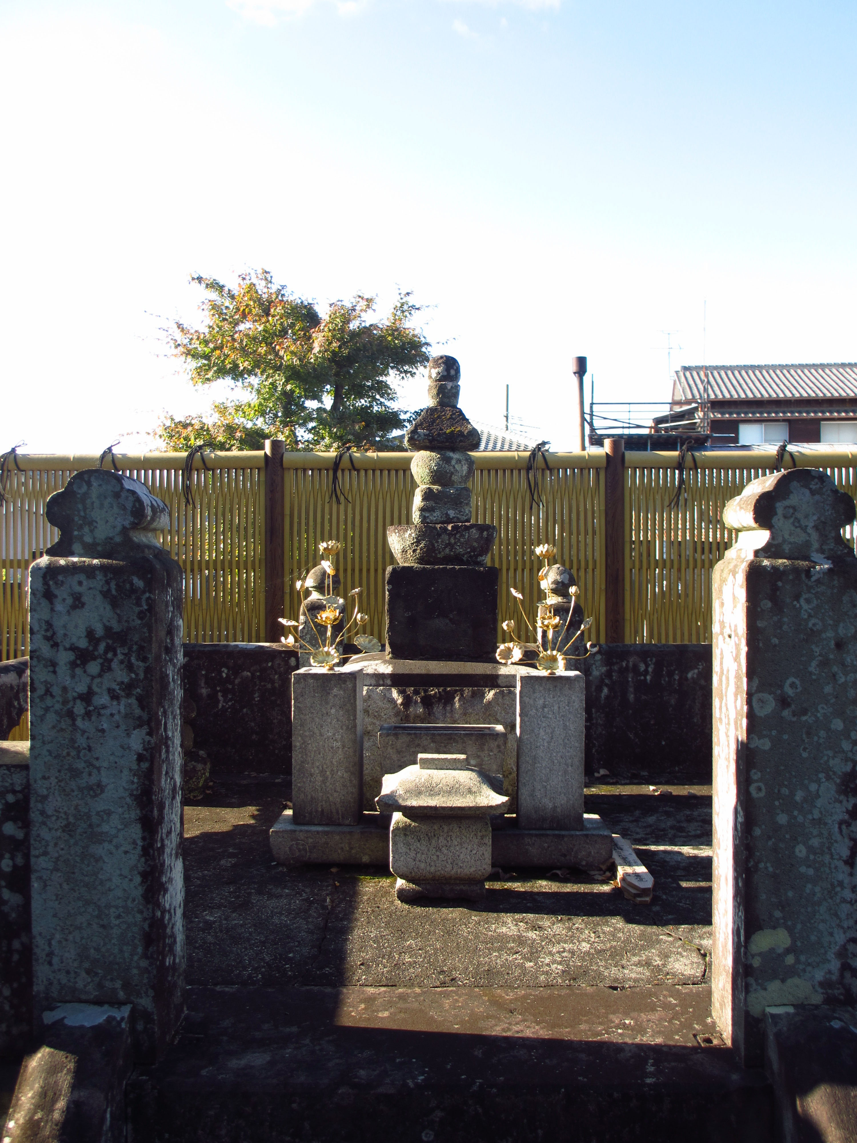 富士市厚原本照寺神四郎墓